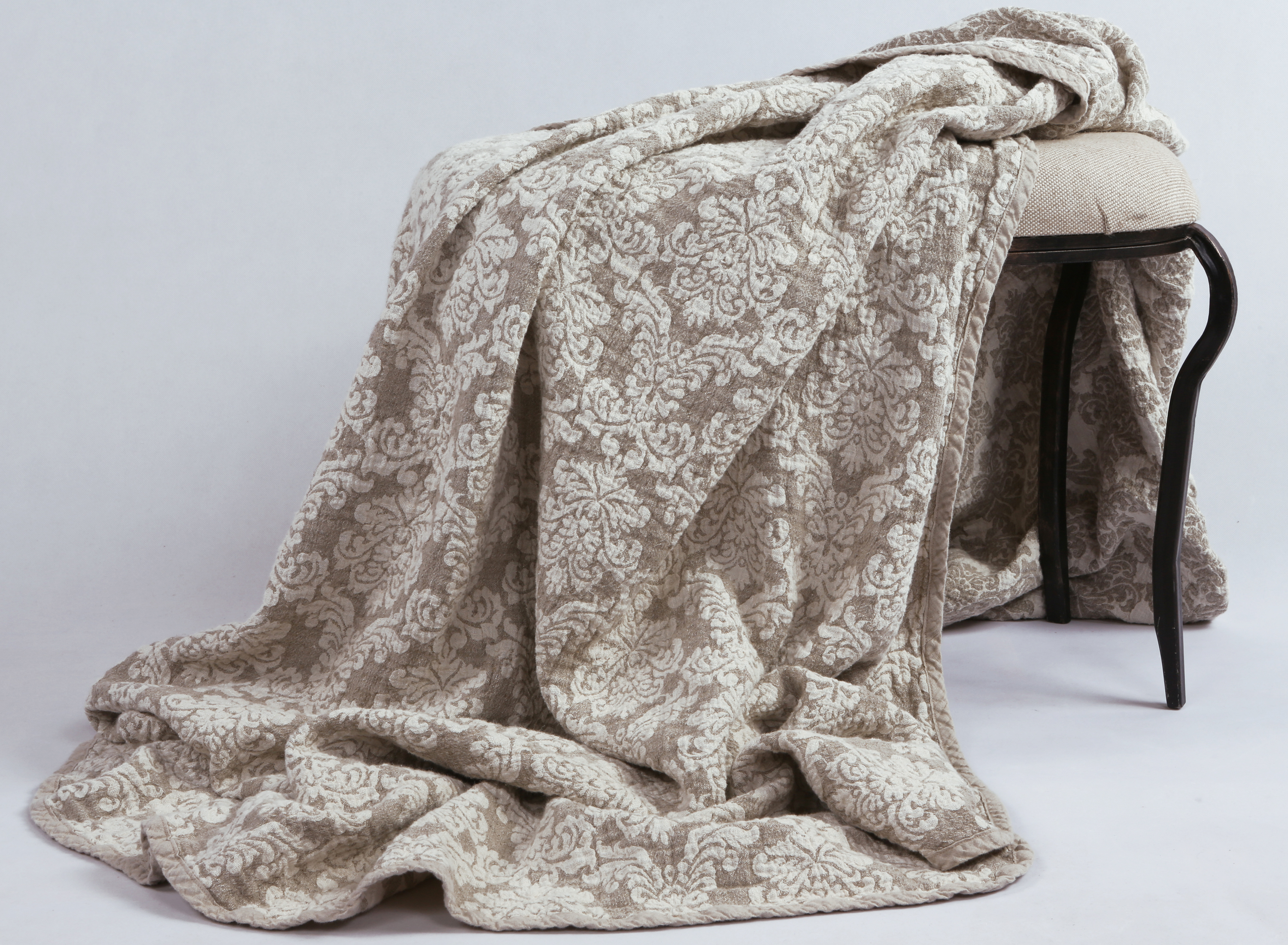 Продукция "Оршанского льнокомбината"